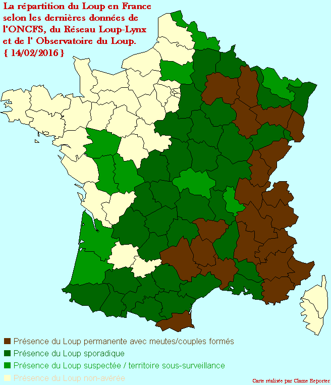 En marron: départements où la présence du Loup est permanente. En vert foncé : départements où la présence du Loup est occasionnelle. En vert clair : départements où la présence du Loup est suspectée / départements sous-surveillance. En beige clair : départements où la présence du Loup est non-avérée. Carte réalisée selon les dernières estimations de l'ONCFS, du Réseau Loup-Lynx et de l'Observatoire du Loup. Carte réalisée par Clame Reporter - Février 2016.